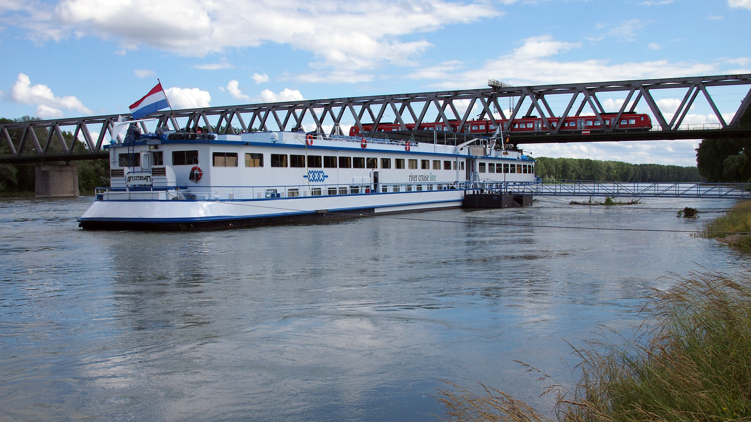 Rheinbrücke Germersheim